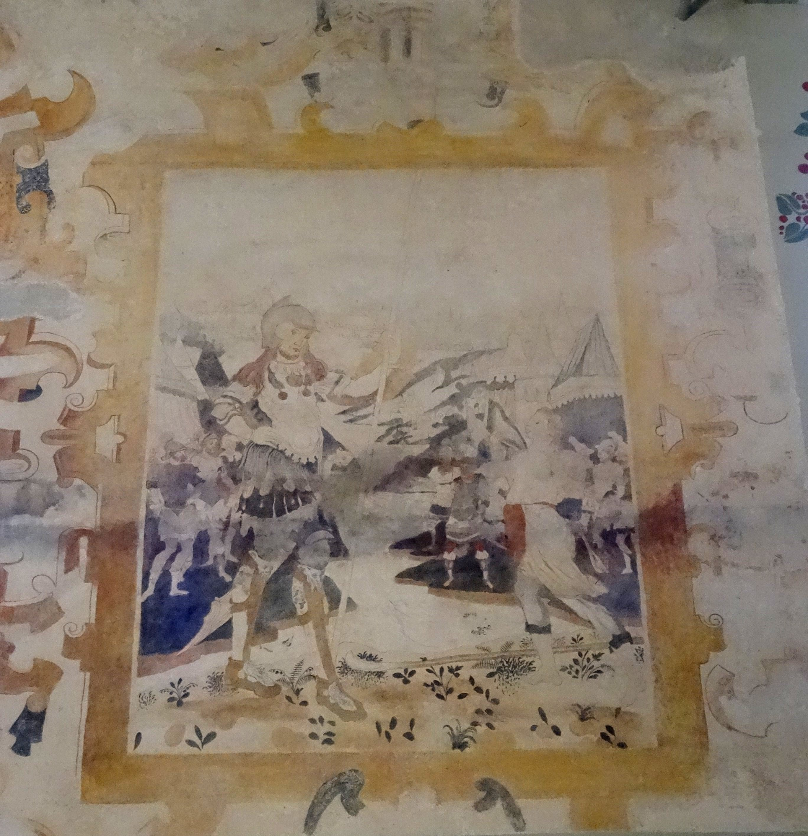 St. Johannes Uelleben. Das Bild von David und Goliath wurde bei der Restaurierung 2004/5 gefunden und freigelegt. Es stammt aus der ursprünglichen Ausmalung der Kirche (1640) nach Ende des 30-jährigen Krieges bei dem die Vorgängerkirche abgebrannt war.